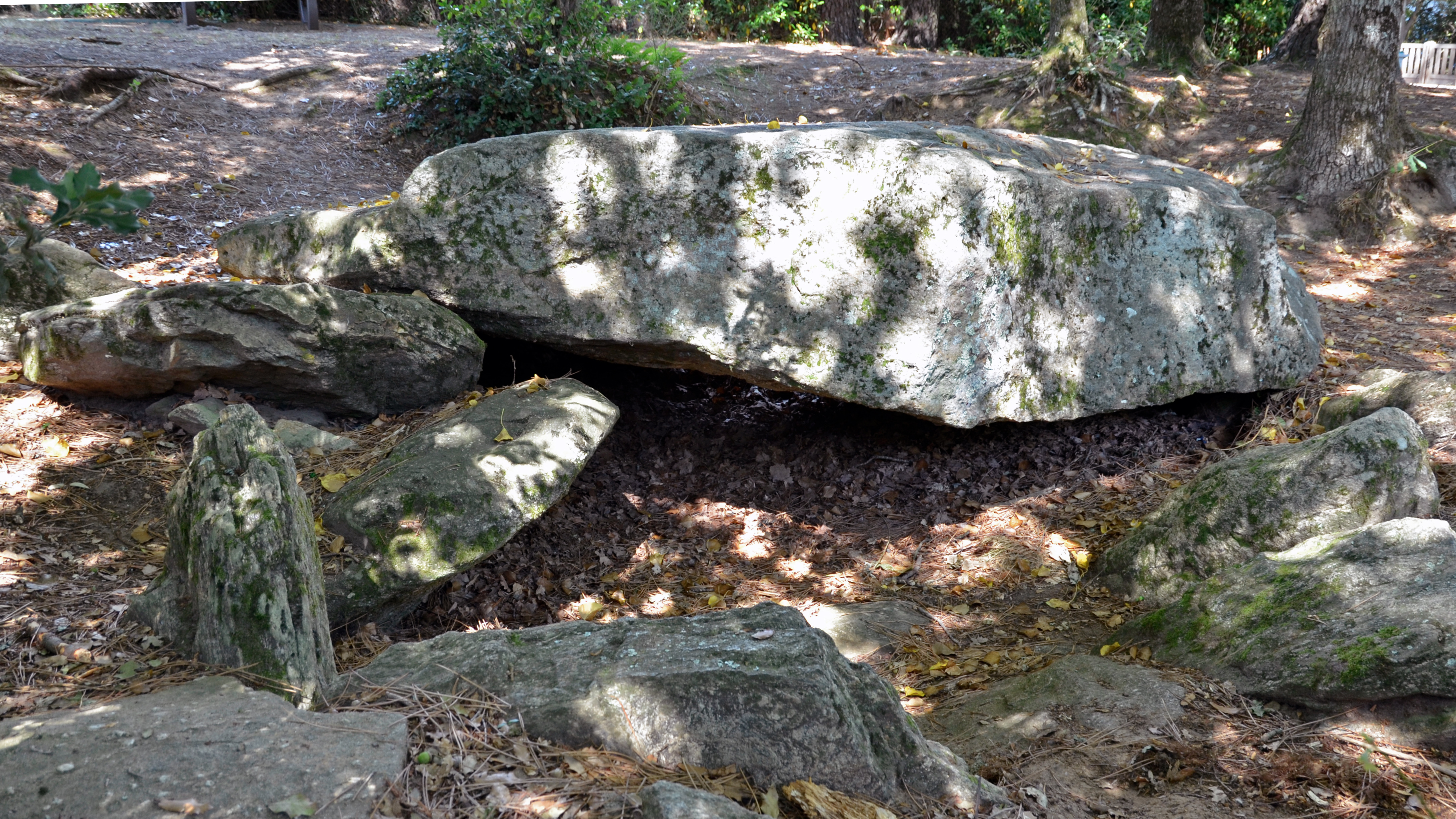 Dolmen des Rossignols - Saint-Brevin-les-Pins, Loire-Atlantique .